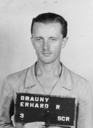 Haftbogenfoto des Angeklagten Erhard Richard Brauny (17.10.1913 in Glauchau/Sachsen - 16.06.1950 in Landsberg), SS-Hauptscharführer; ab 1937 im KZ Sachsenburg, ab 1938 im KZ Buchenwald tätig; August 1943 - November 1944 Rapportführer im KZ Mittelbau-Dora; ab November 1944 Lagerführer im Außenlager Rottleberode des Konzentrationslagers Mittelbau-Dora, im Dachauer Dora-Prozess ("Case No. 000-50-37 Dora") am 30.12.1947 zu lebenslanger Haft verurteilt; im Lazarett des Gefängnisses Landsberg verstorben.